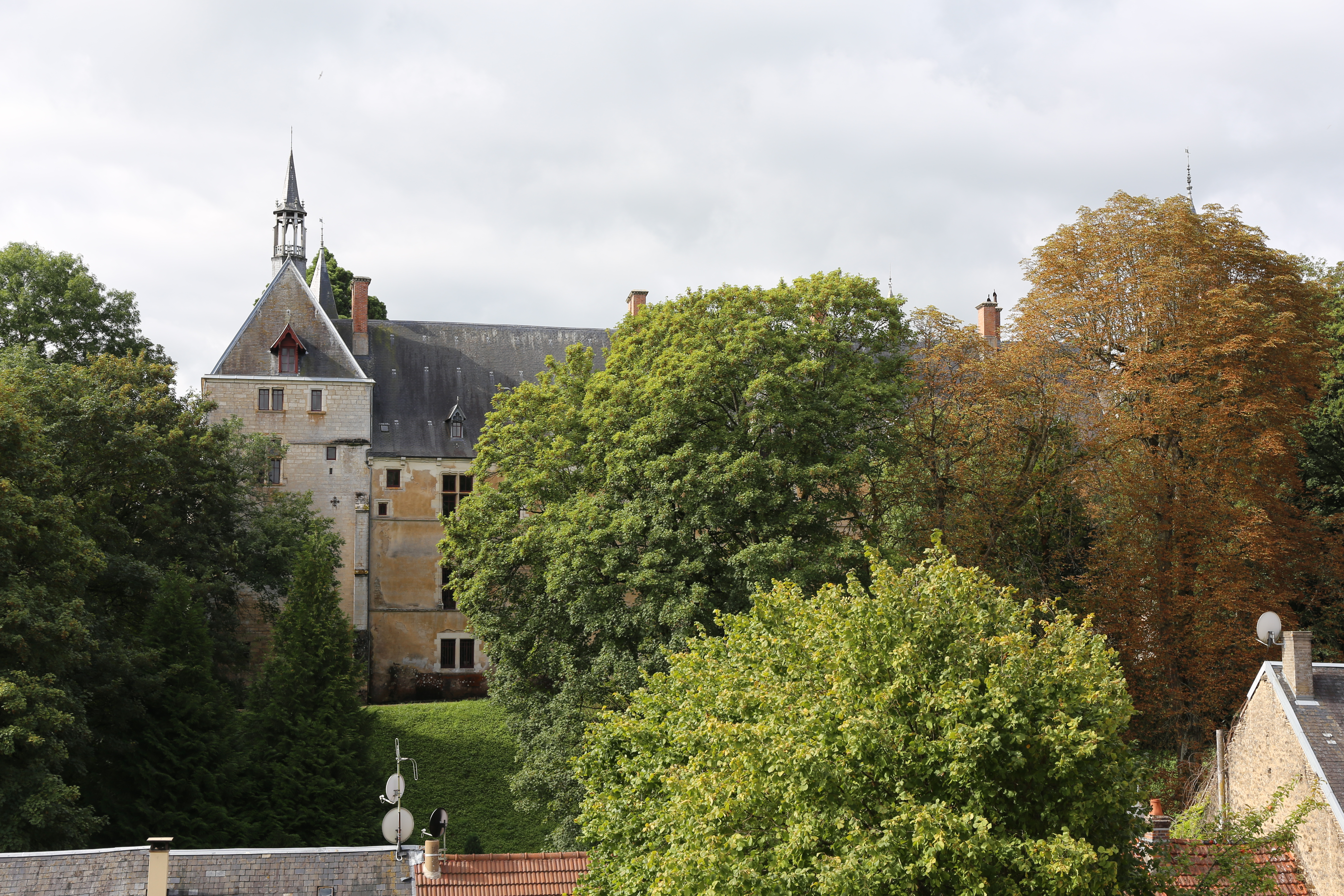 Château de Thoisy-la-Berchère.